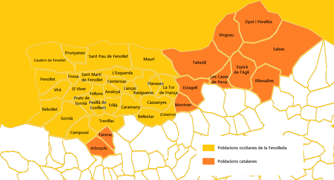 Mapa del Cantó de la Vall de l'Aglí elaborat a partir d'un mapa de lliure disposició